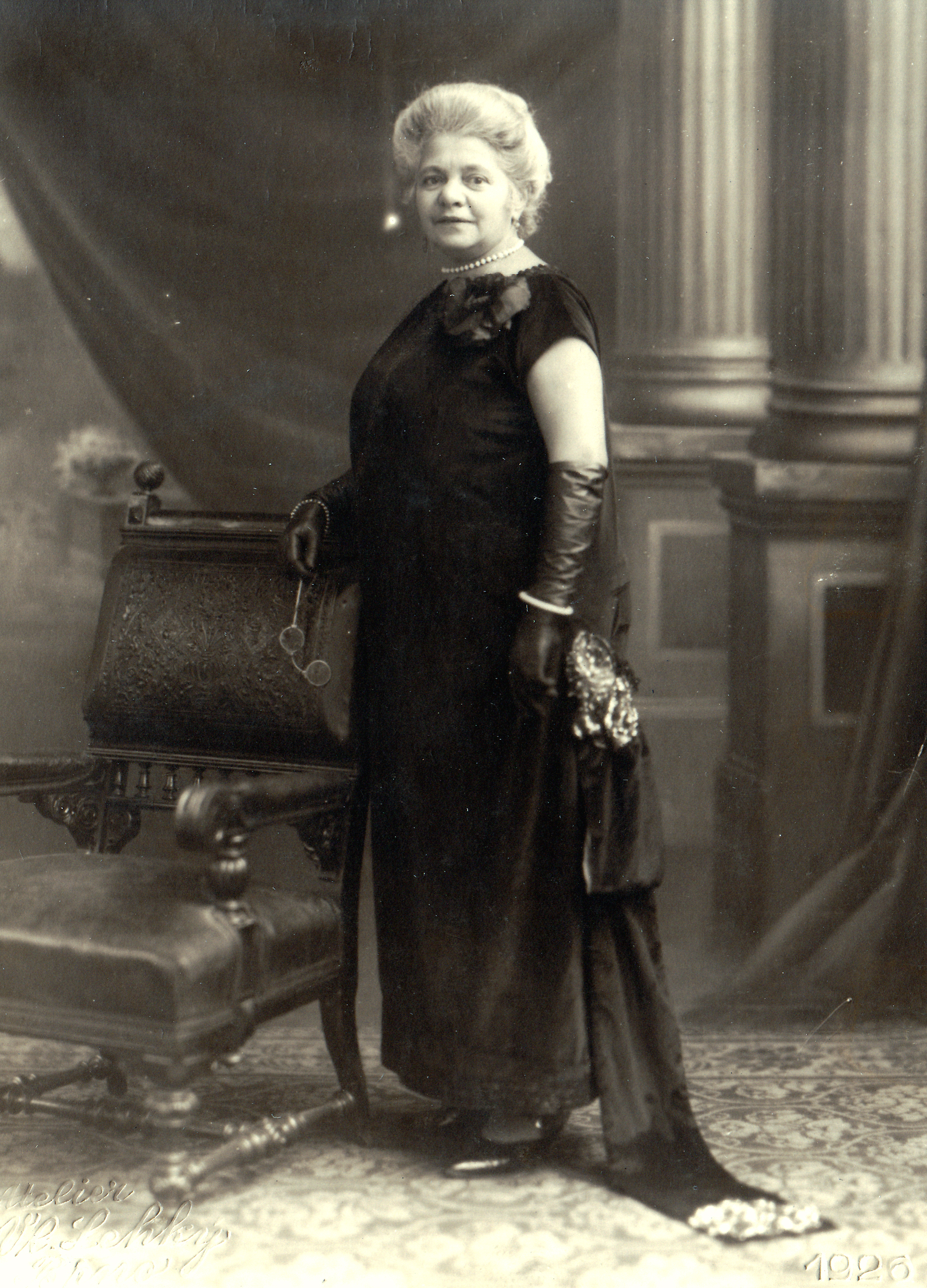 Ema Pechová (1869 - 1965), Česká divadelní herečka.